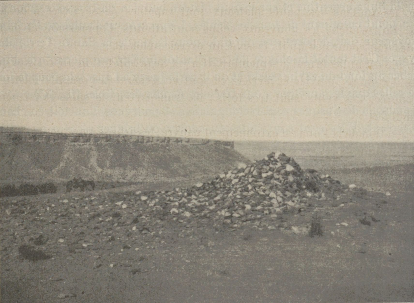 Apacheta, monticule votif